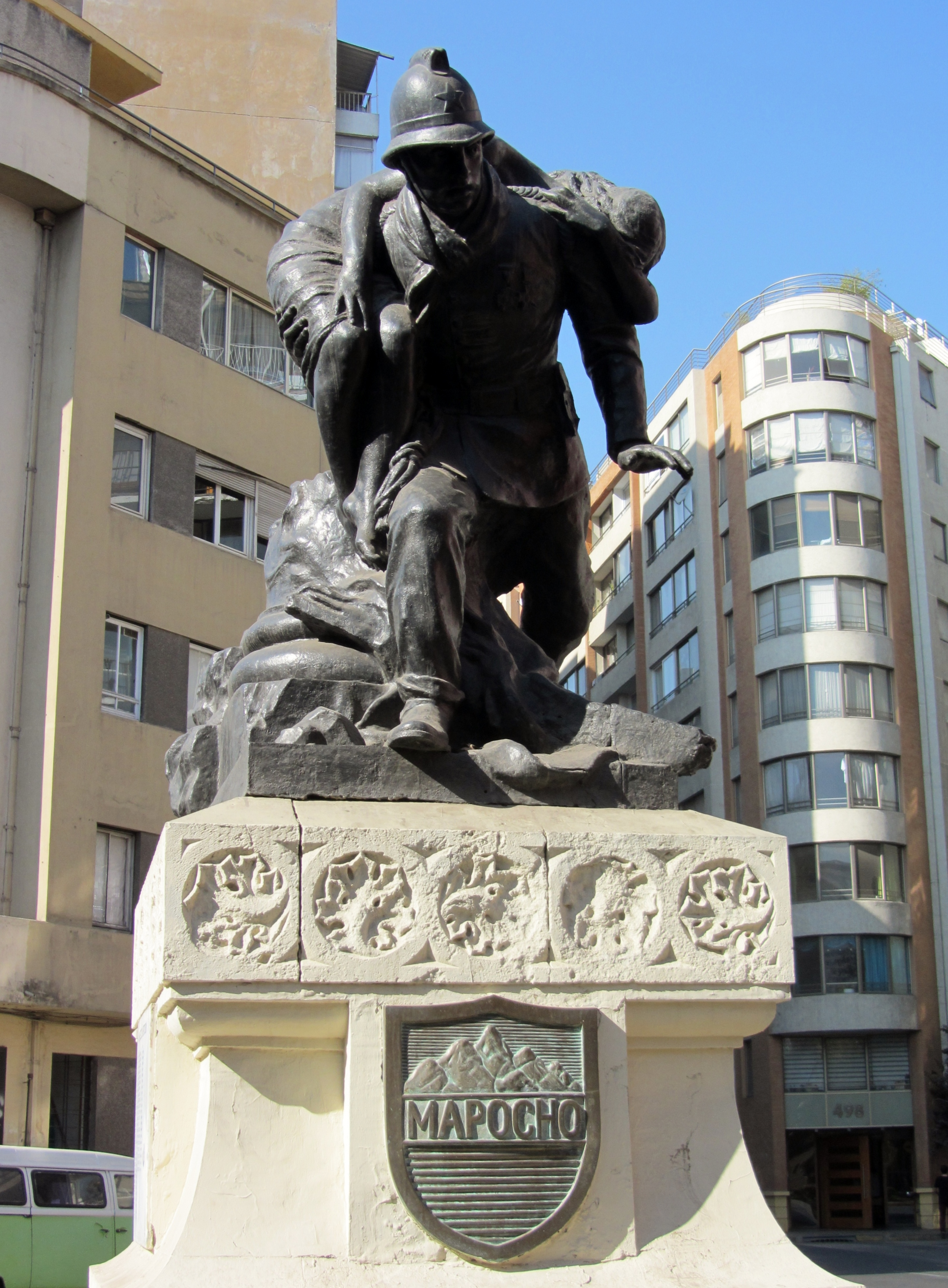 El conjunto escultórico está ubicado a un costado del Museo de Arte Contemporáneo (MAC), casi a la salida de calle Mosqueto sobre la placita triangular de calle Ismael Valdés Vergara, allí donde se abren las calles Esmeralda y Santo Domingo, en Santiago de Chile.